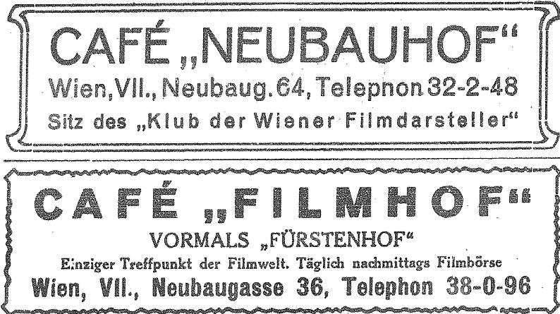 Inserate der Cafés Neubauhof und Filmhof in der Wiener Filmzeitschrift "Die Filmwelt" (en: advertisings for two Vienna Cafés in a film-magazine)